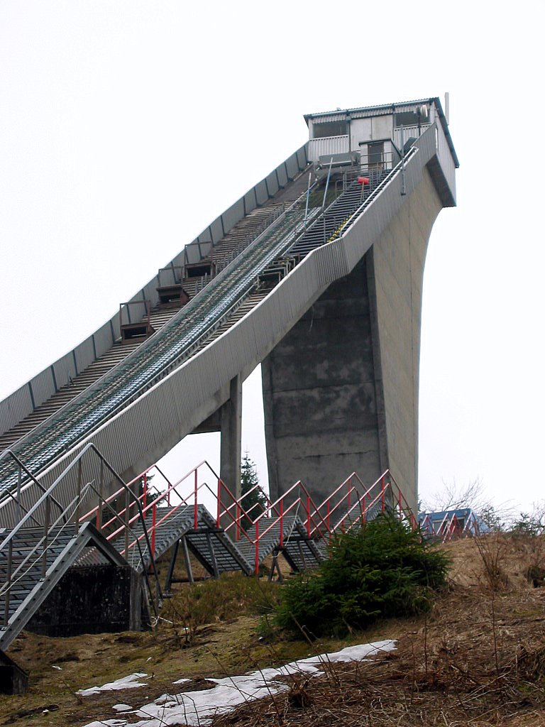 Schanzenturm der Hans Renner Schanze in Oberhof im April 2006